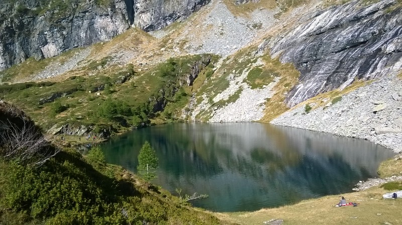 Alte Valli Anzasca, Antrona e Bognanco (Q47087434)